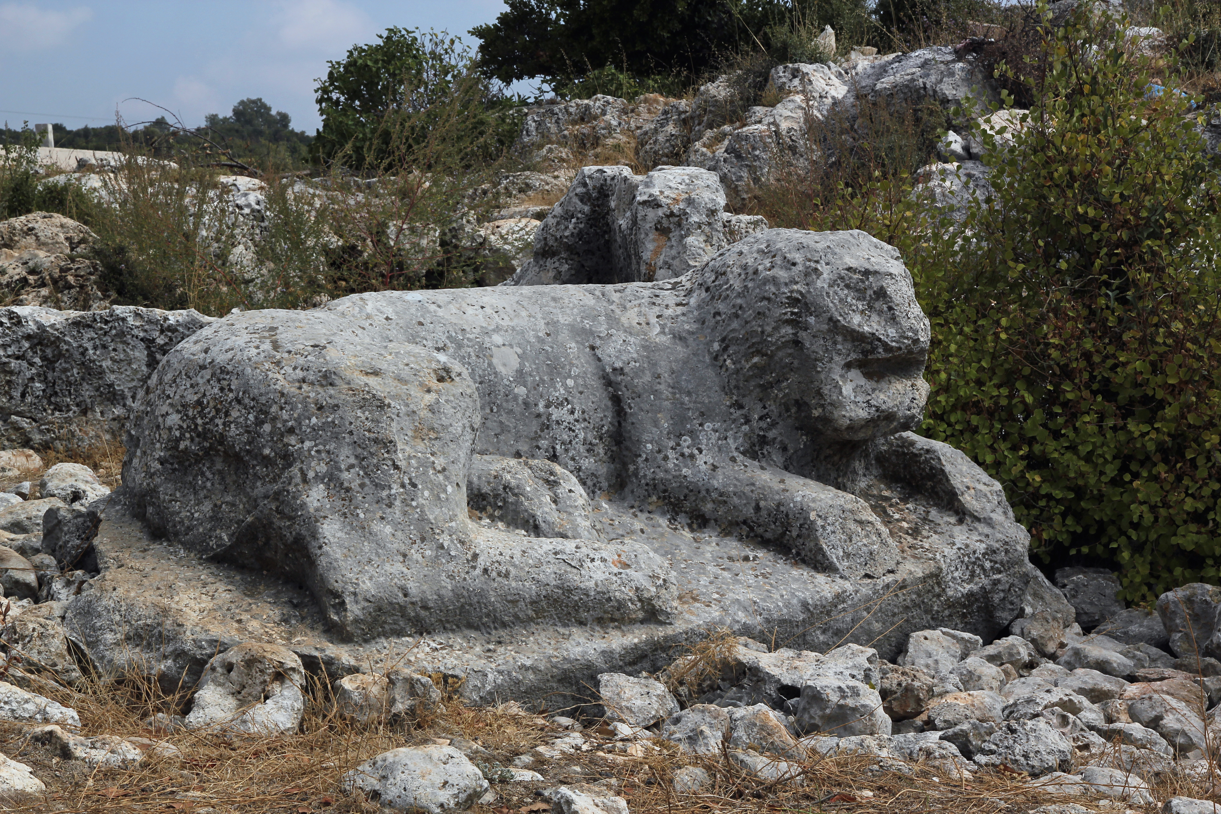 Tekkadın, römisch-byzantinische Siedlung in Kilikien bei Silifke, Südtürkei, Sarkophagdeckel mit Löwenskulptur